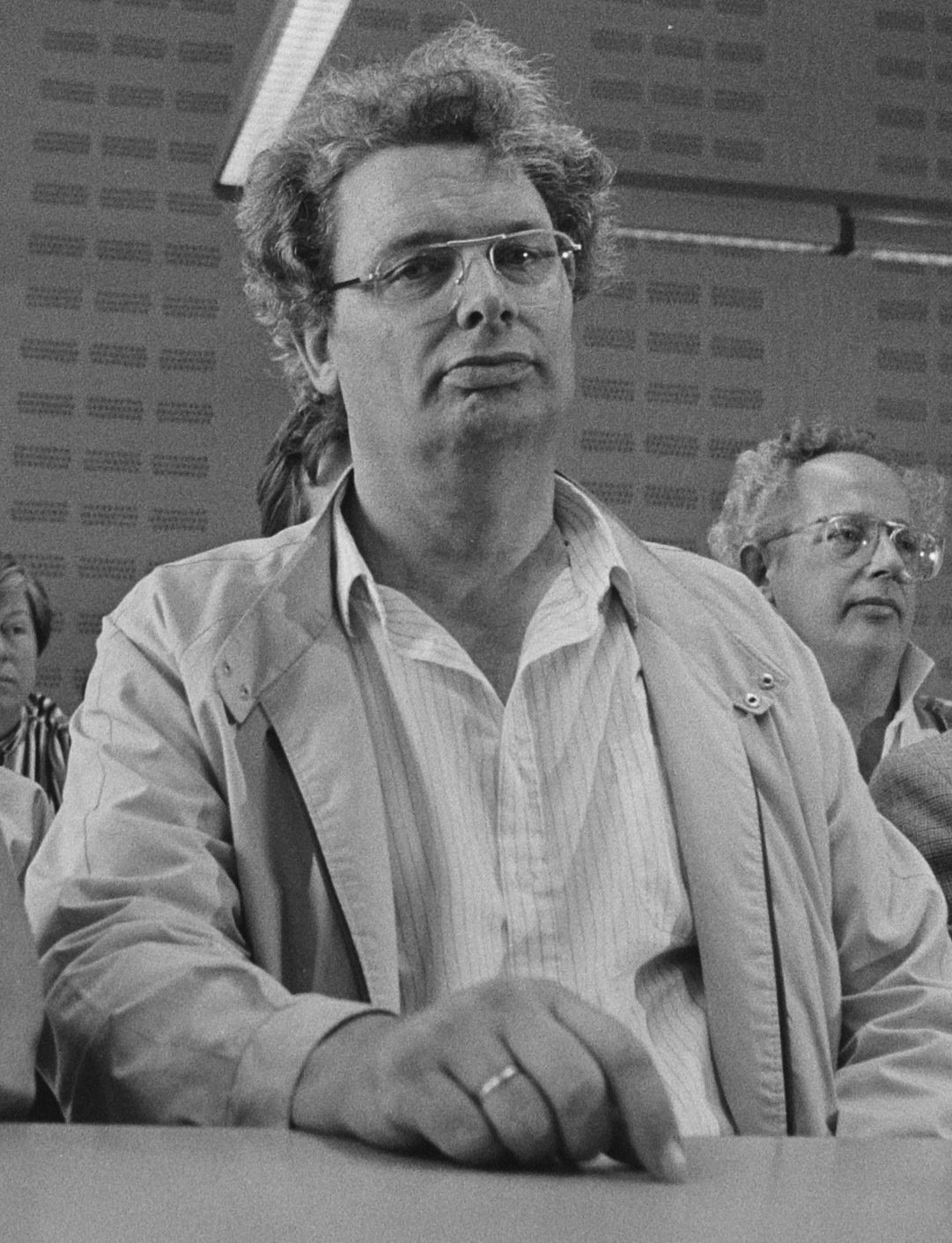 Uitspraak kort geding Hilversum i.v.m. verkoop schilderij van Mondriaan; v.l.n.r. wethouder mevr. Weijers, Van Dam en burgemeester Van der Sluis